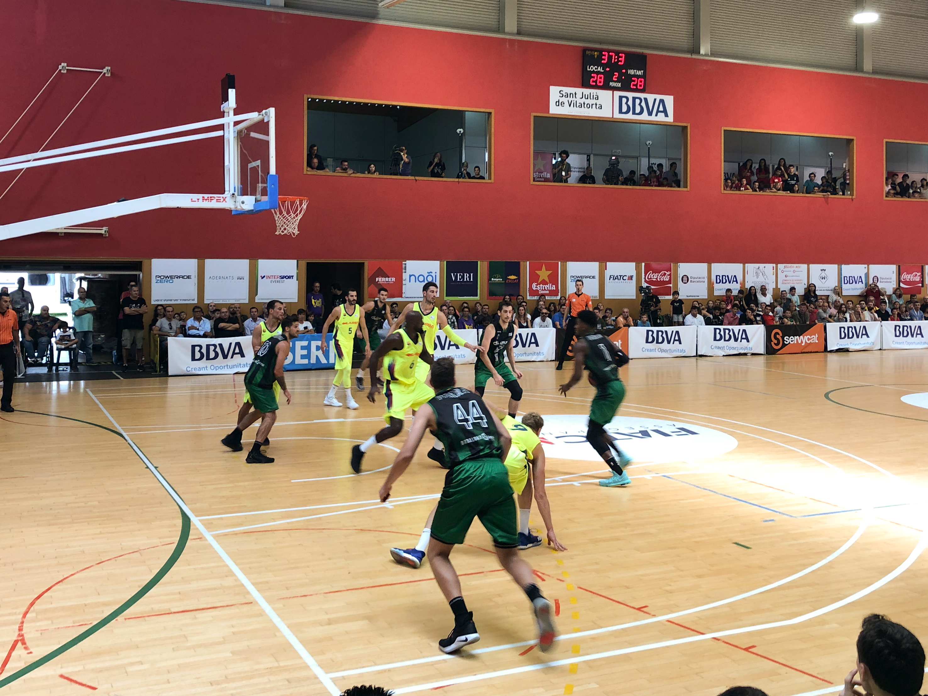 Partit de la pretemporada 2018-19 entre el Divina Seguros Joventut i el Barça Lassa, disputat a Sant Julià de Vilatorta